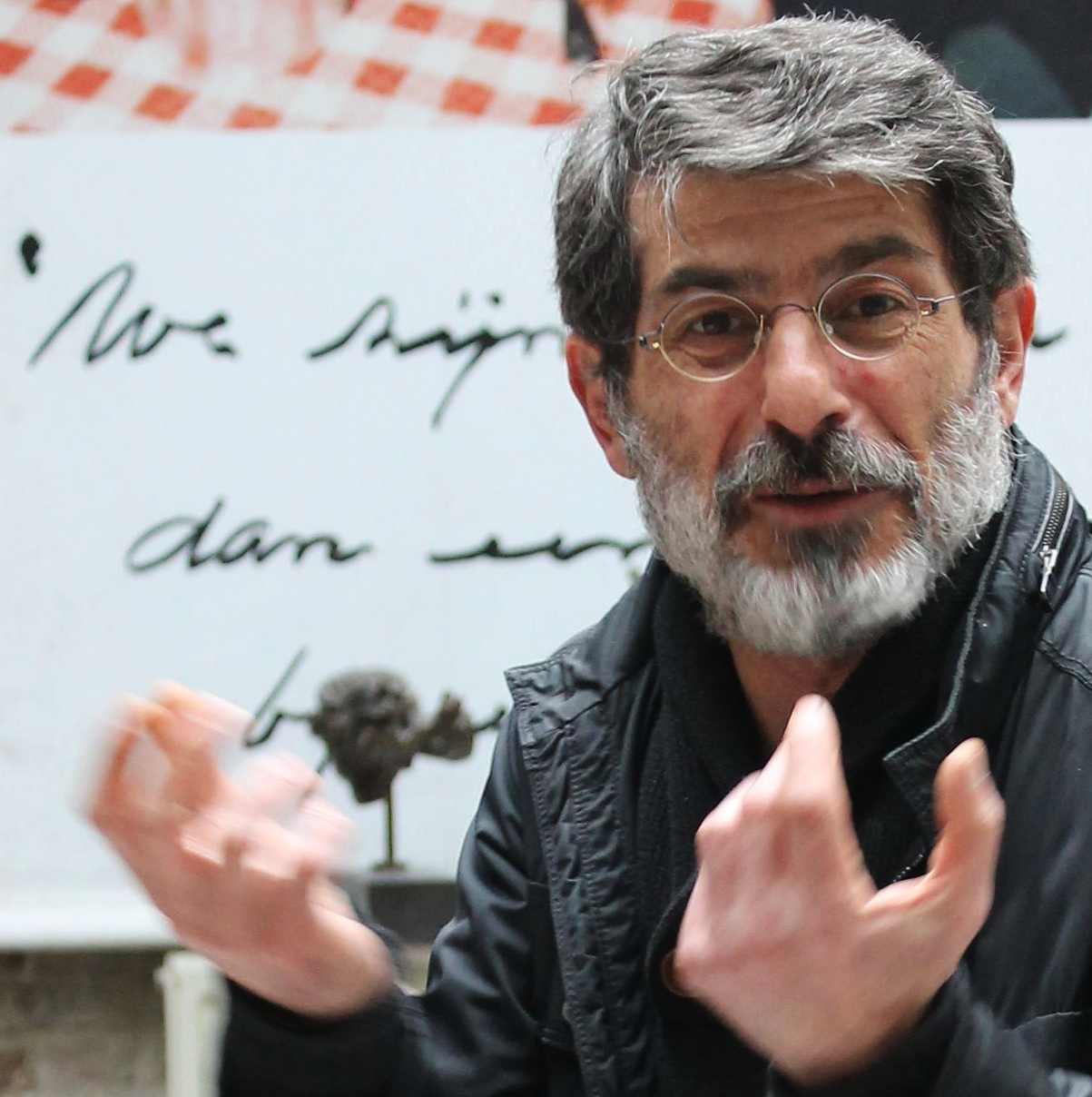 Amiran Djanashvili in zijn atelier, mei 2015